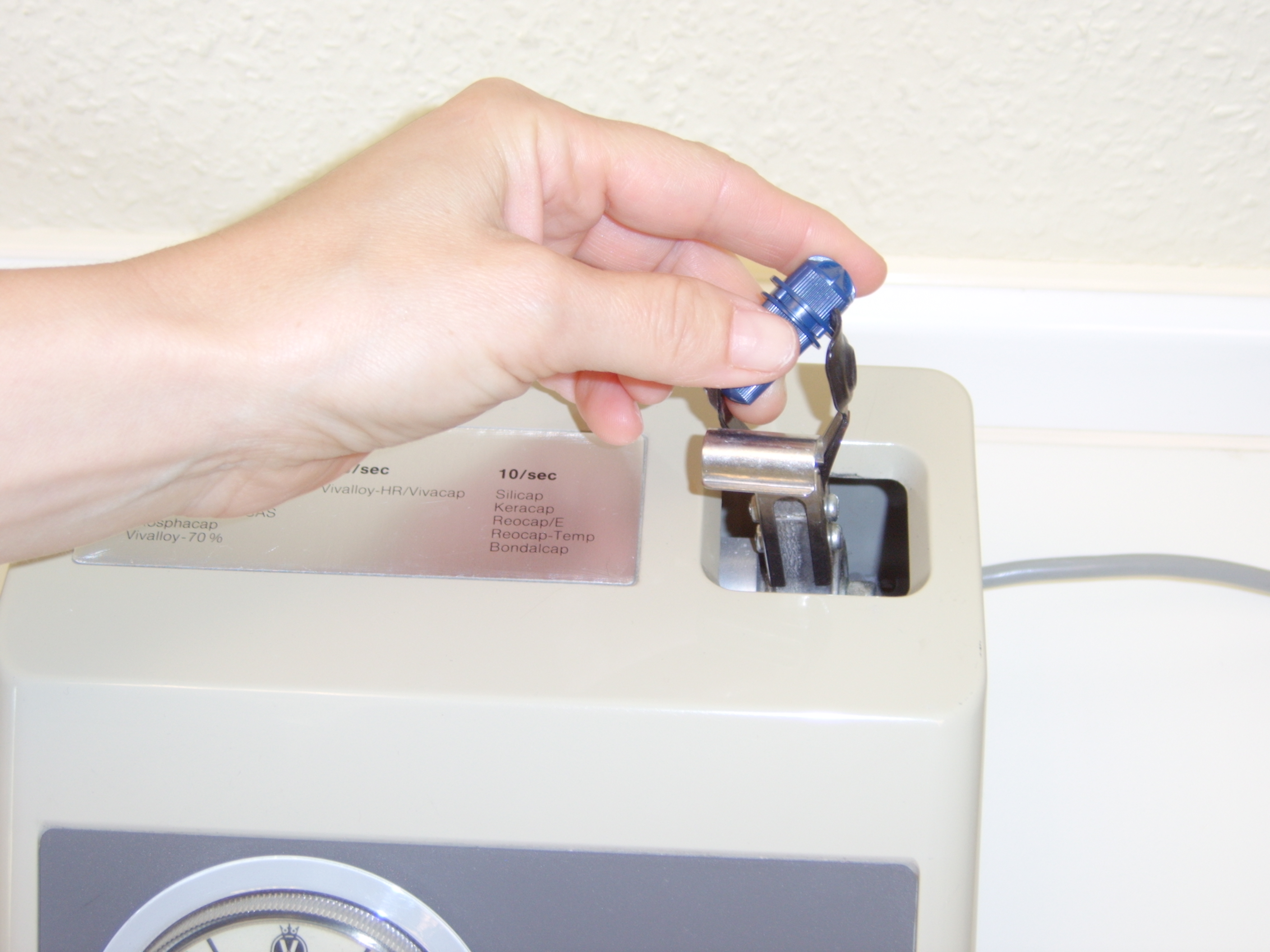 Amalgamrüttler für Amalgamfüllungen